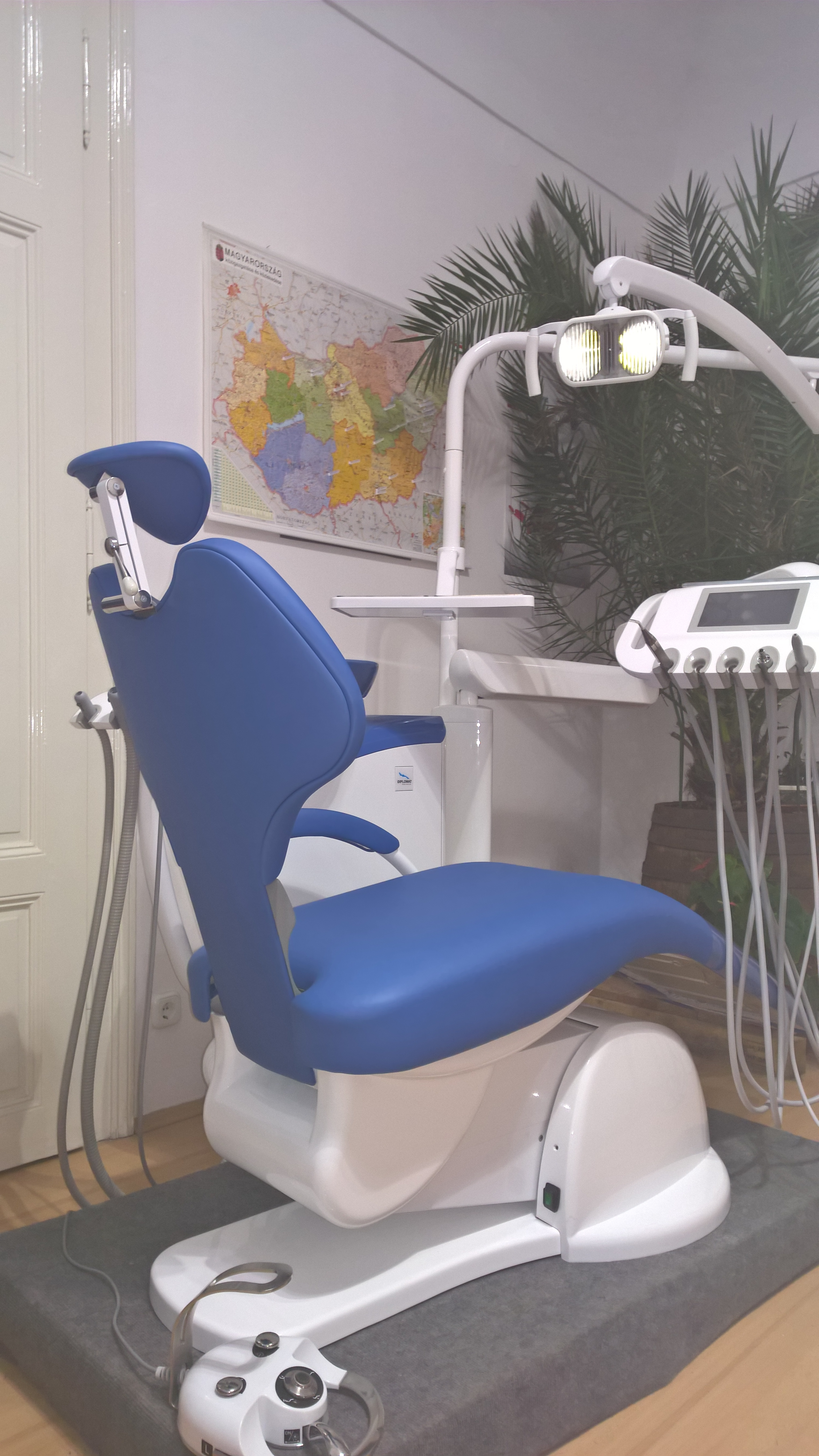 Diplomat DL 210